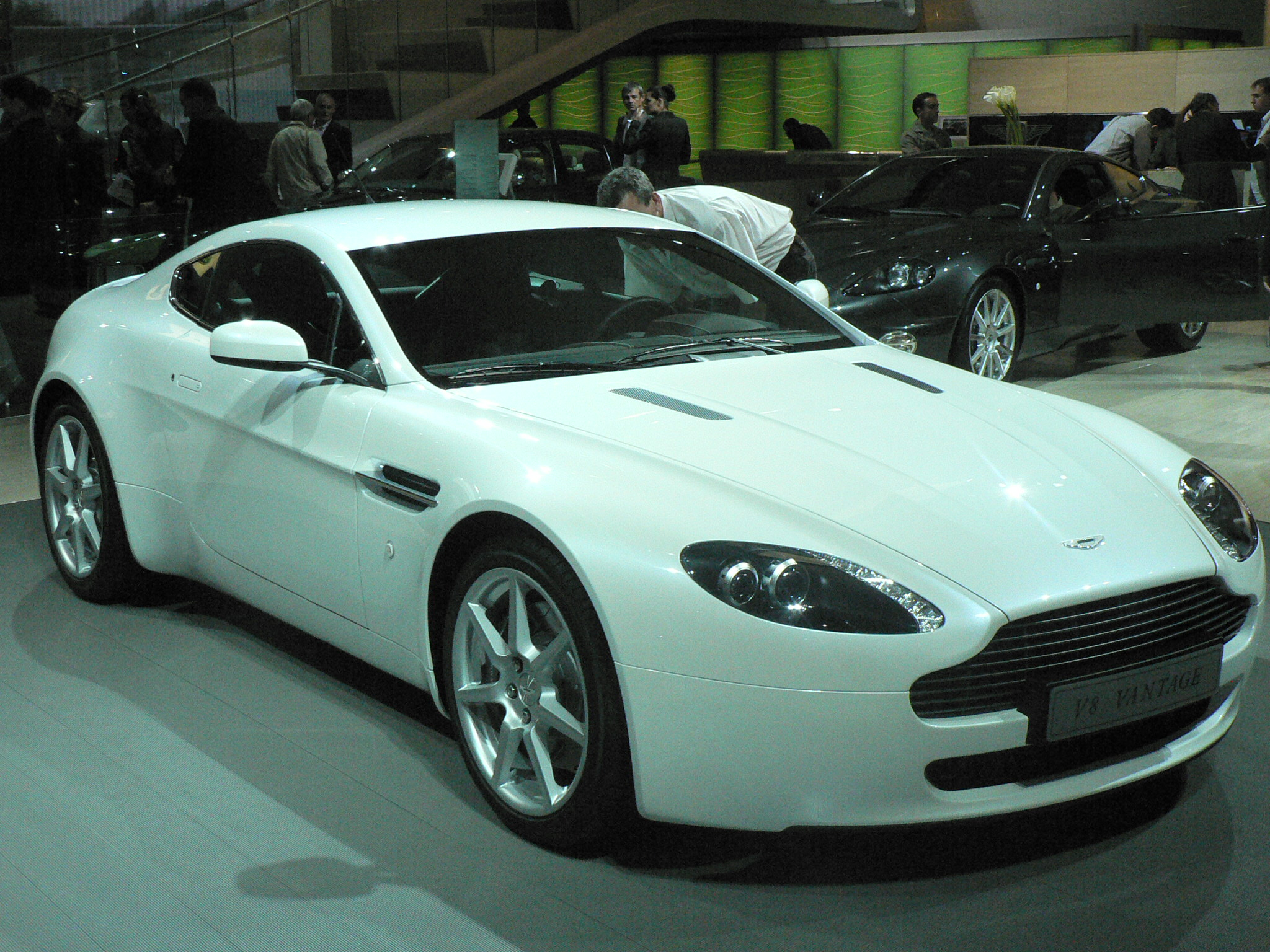 Mondial de l'automobile, Paris 2006